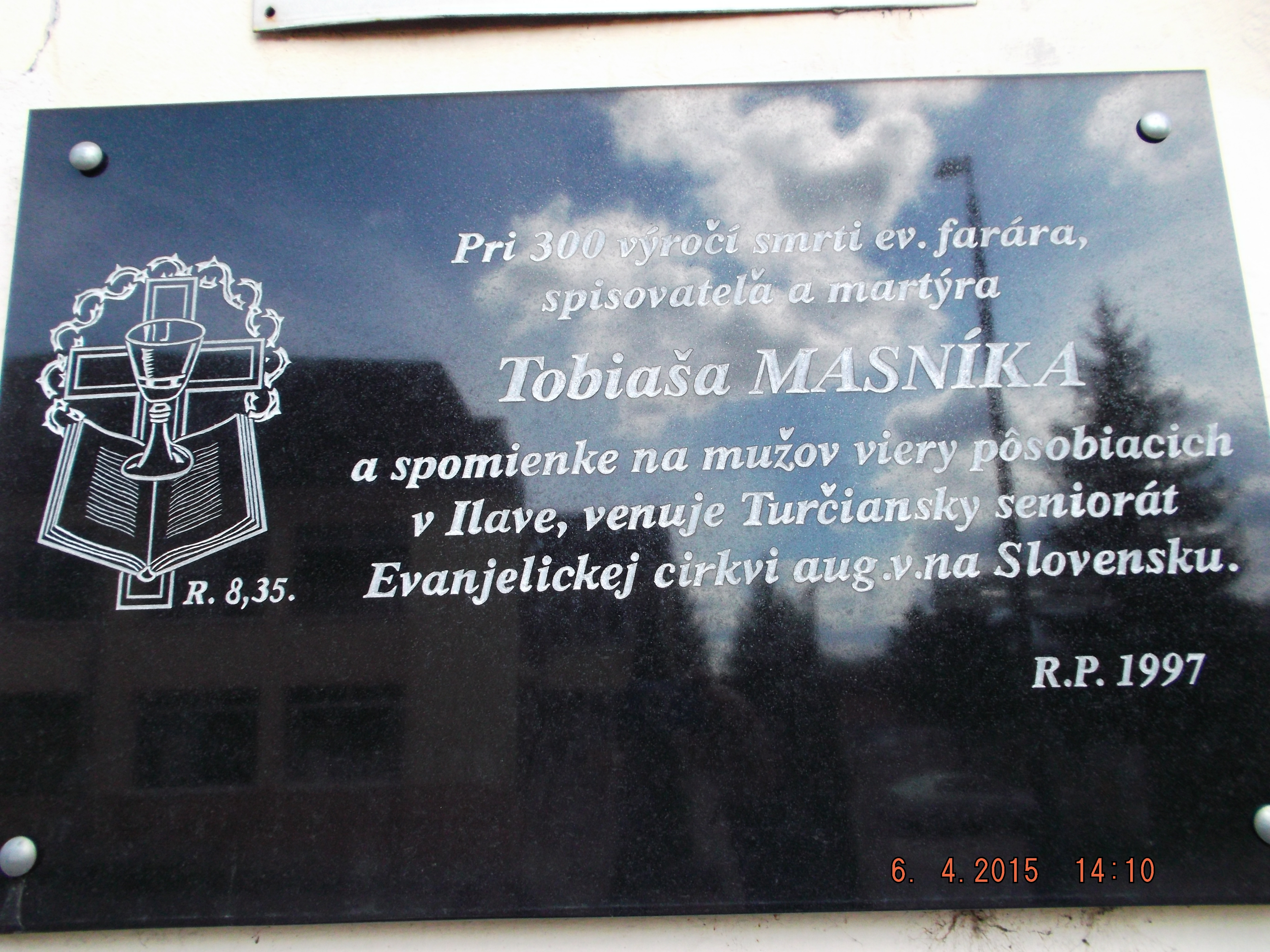 Pamätná tabuľa v Ilave